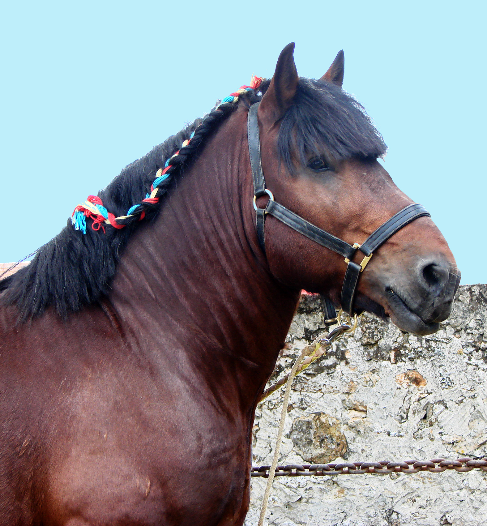 Tête d'étalon de race ardennaise.(Arrière-plan modifié)